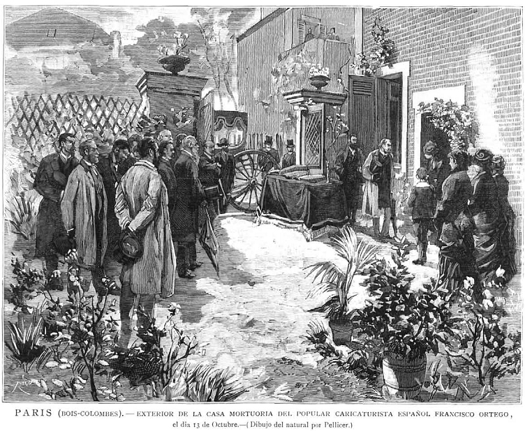 Exterior de la casa mortuoria del popular caricaturista español Francisco Ortego Vereda|Francisco Ortego, París (Bois-Colombes), dibujo al natural de José Luis Pellicer, recogido en la revista española La Ilustración Española y Americana.